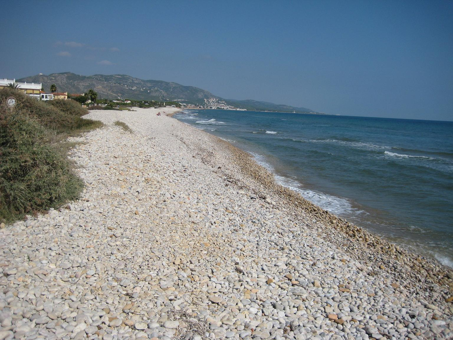 Platja del Serradal a Capicorb en el municipi d'Alcalà de Xivert